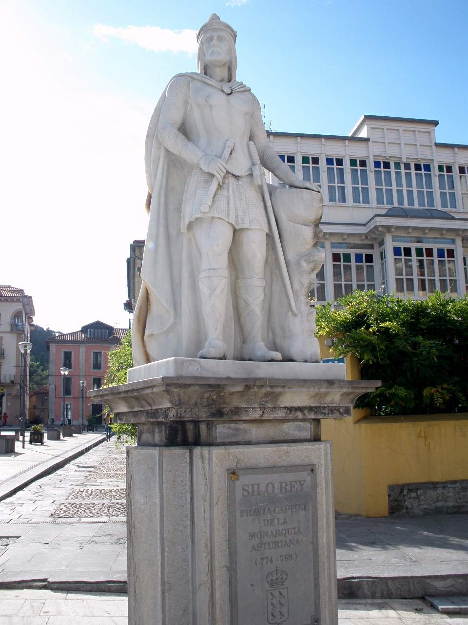 Monumento al rey Silo en Pravia (Asturias)